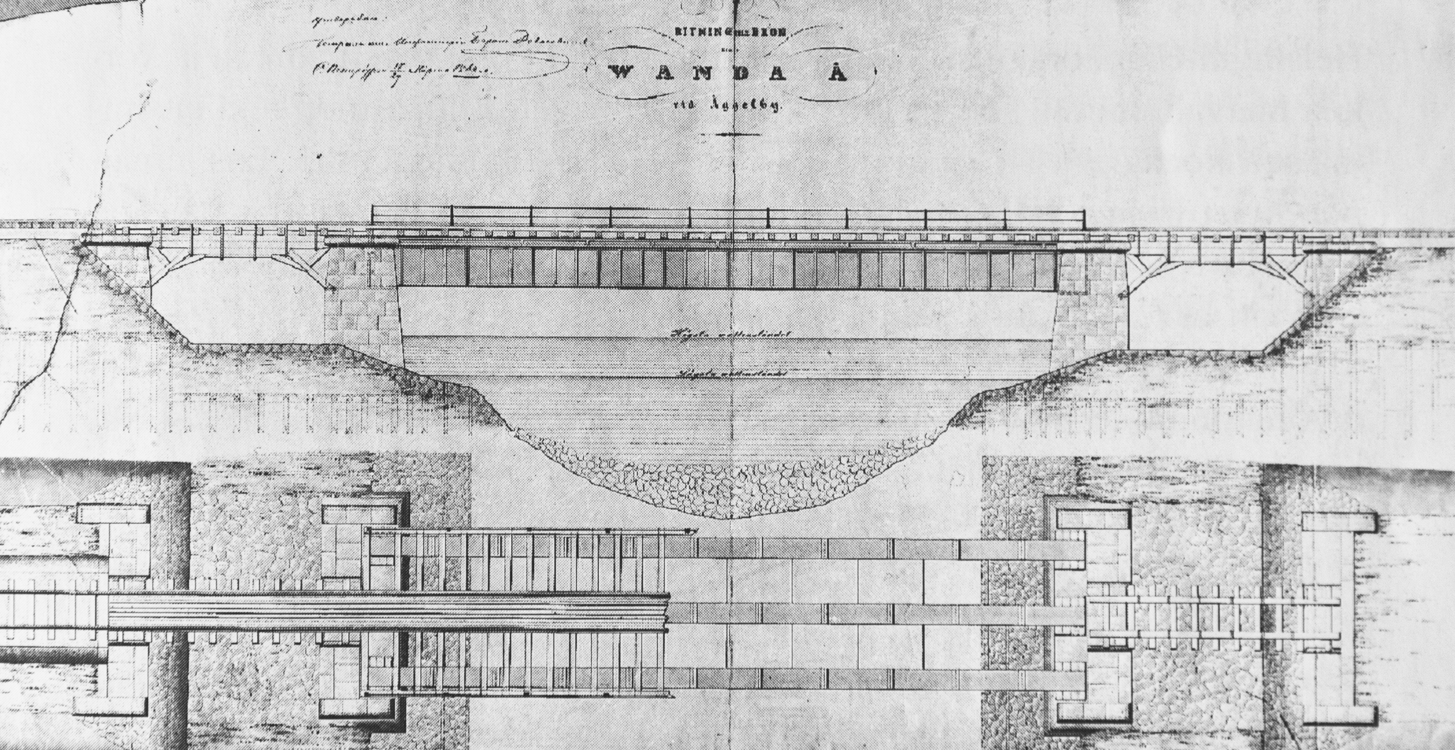 Suomen ensimmäinen rautatiesilta rakennettiin ylittämään Vantaanjoki Oulunkylän ja Pukinmäen välillä. Kuvassa sillan piirustukset vuodelta 1862.